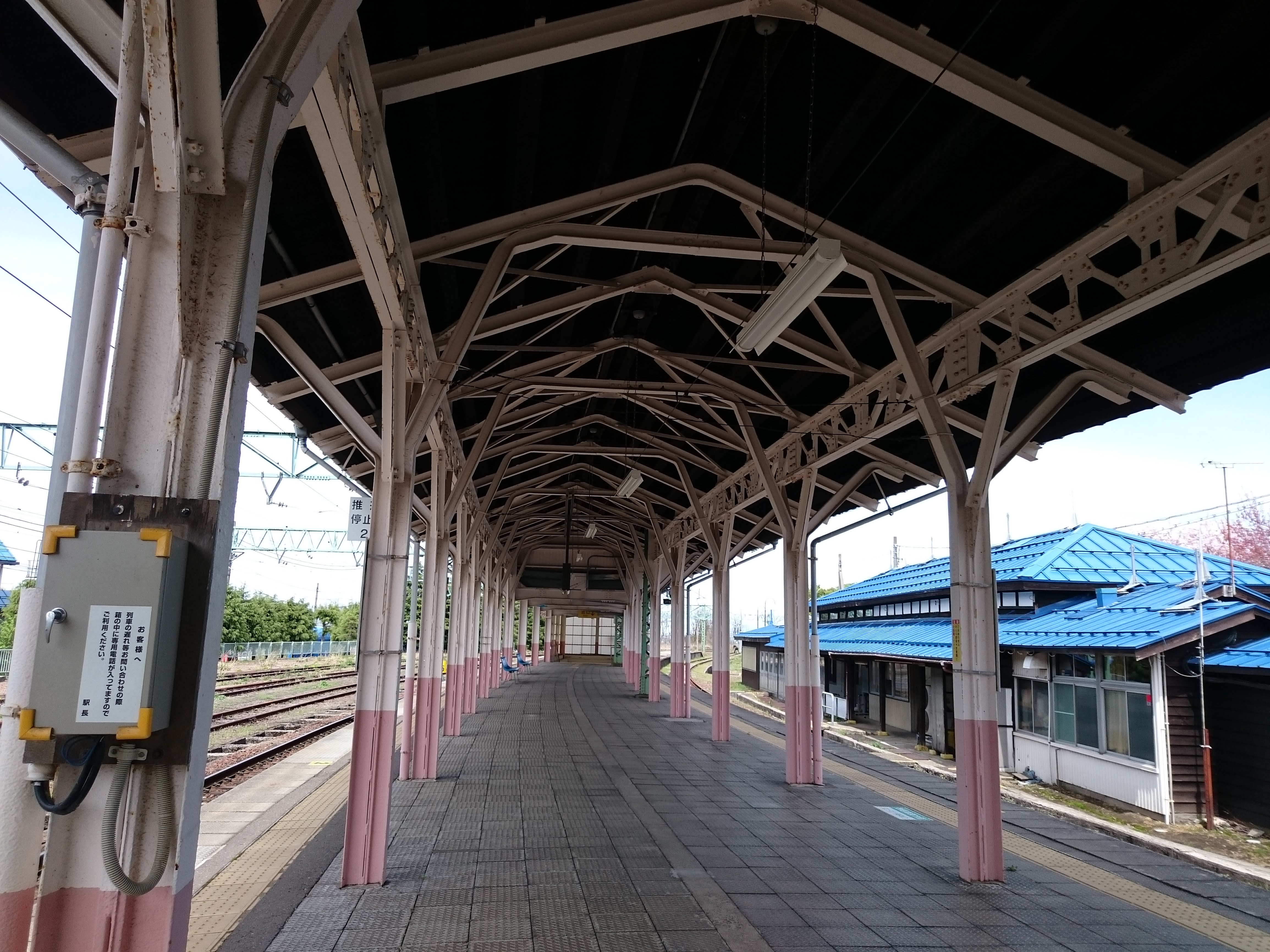 二本木駅のホーム